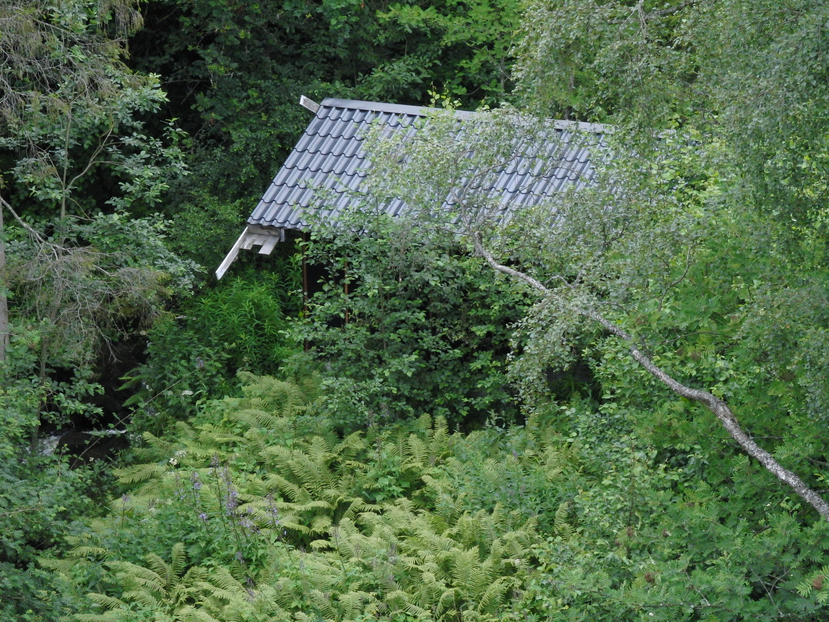 Buru mikrokraftverk